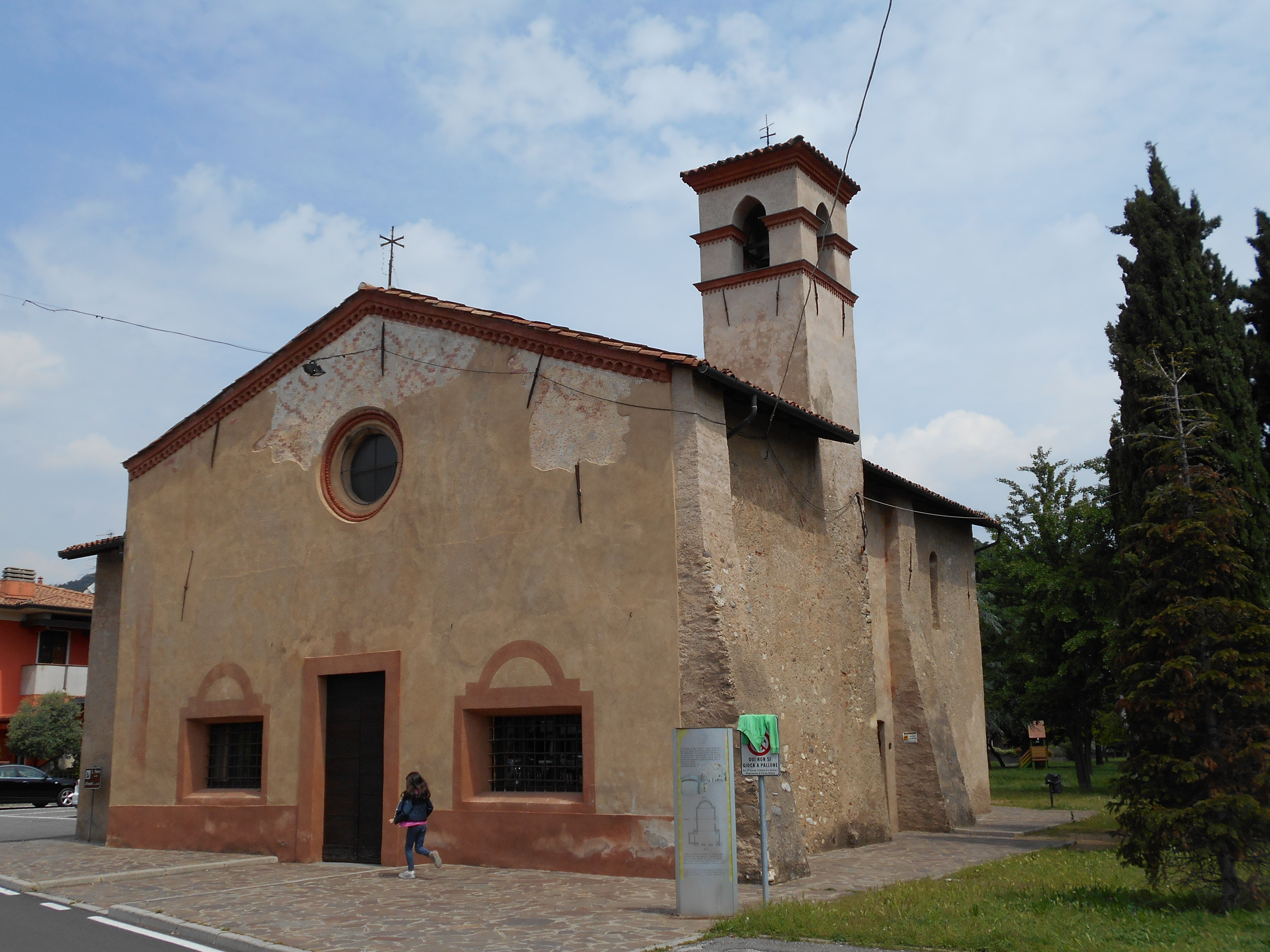 Chiesa di San Pietro, Coccaglio